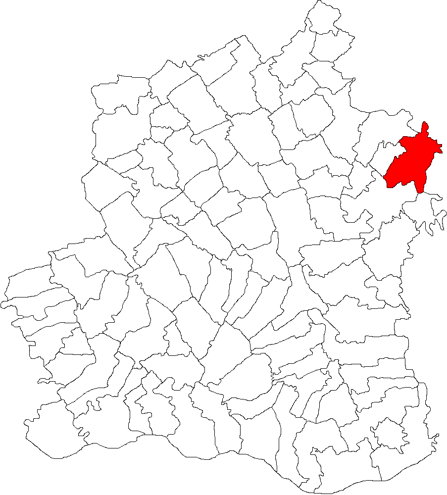 Categorie:Hărţi ale judeţului Teleorman